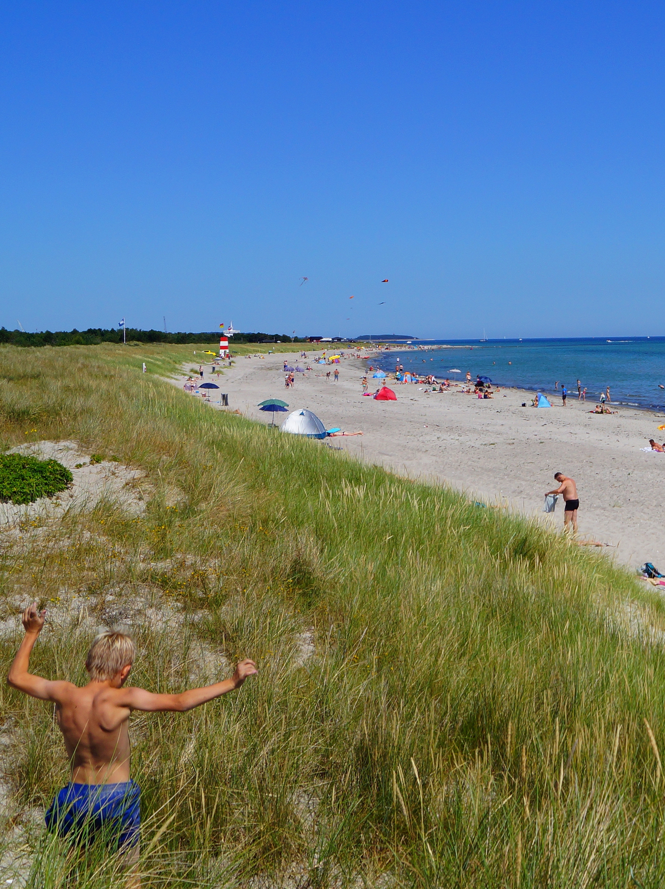 Grenå Strand